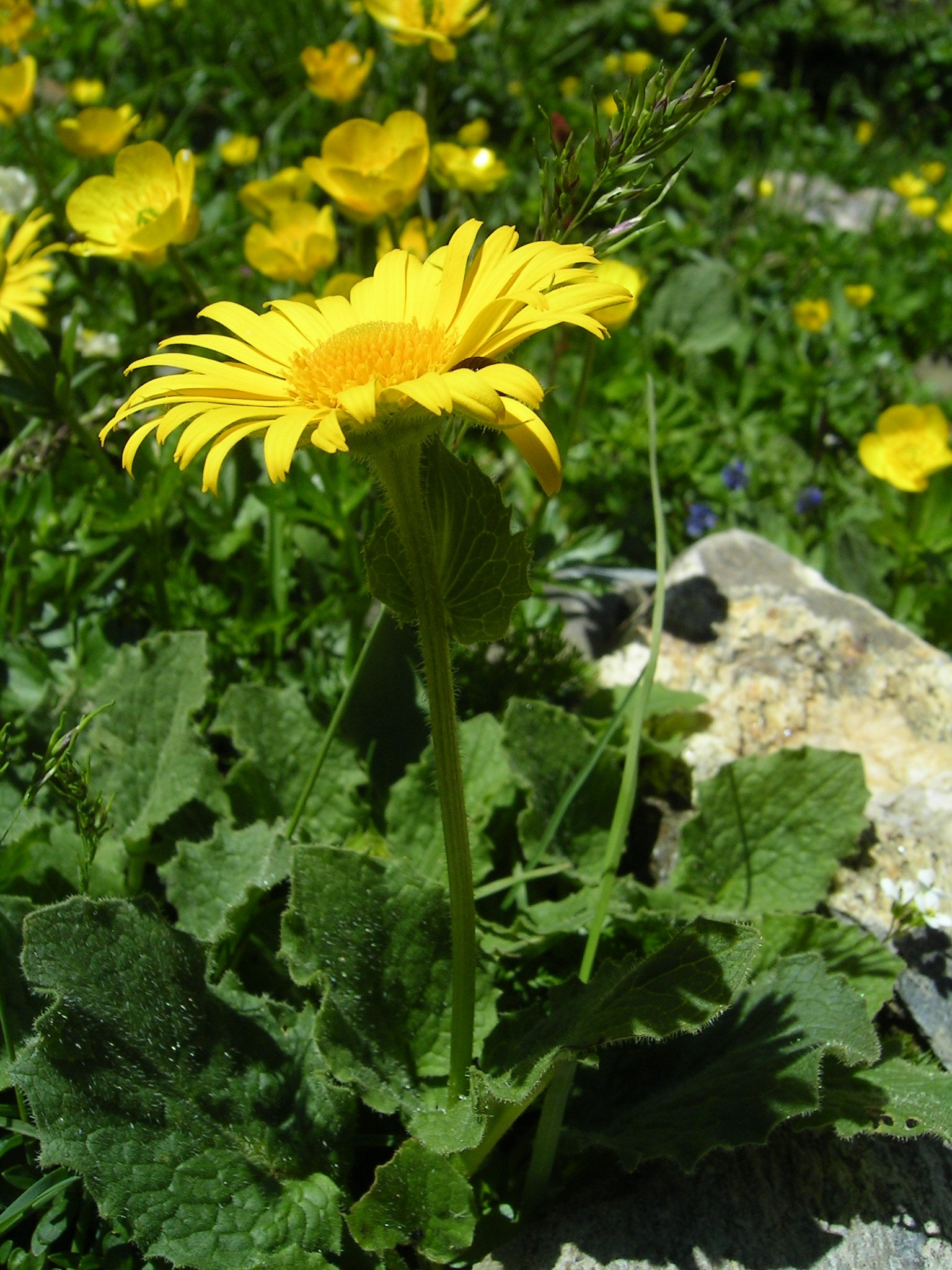 (en) Place: Greina, Switzerland Editing: none (de) Grosser Gämswurz (Doronicum grandiflorum) Aufnahmeort: In der Nähe der Greina-Ebene, Schweiz Bearbeitung: keine